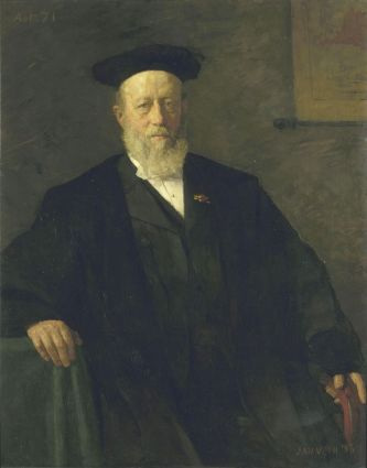 Pieter Johannes Veth (1814-1895)